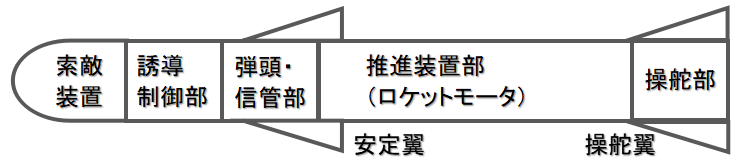 ミサイルのイラスト（構造図）